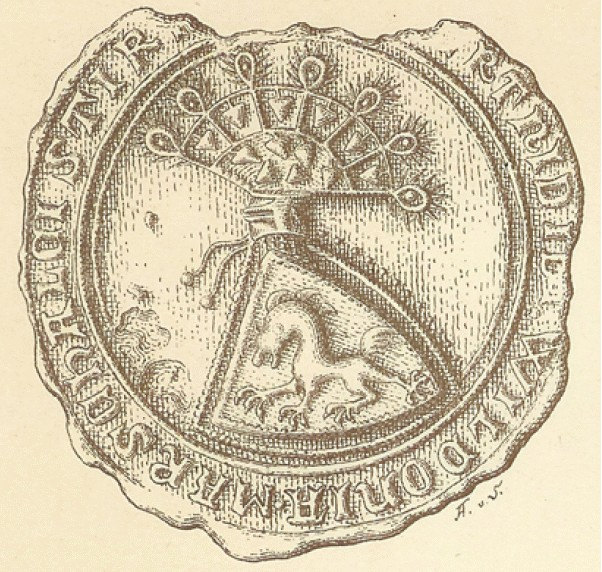 Hartnid III. (Wildon) 1278